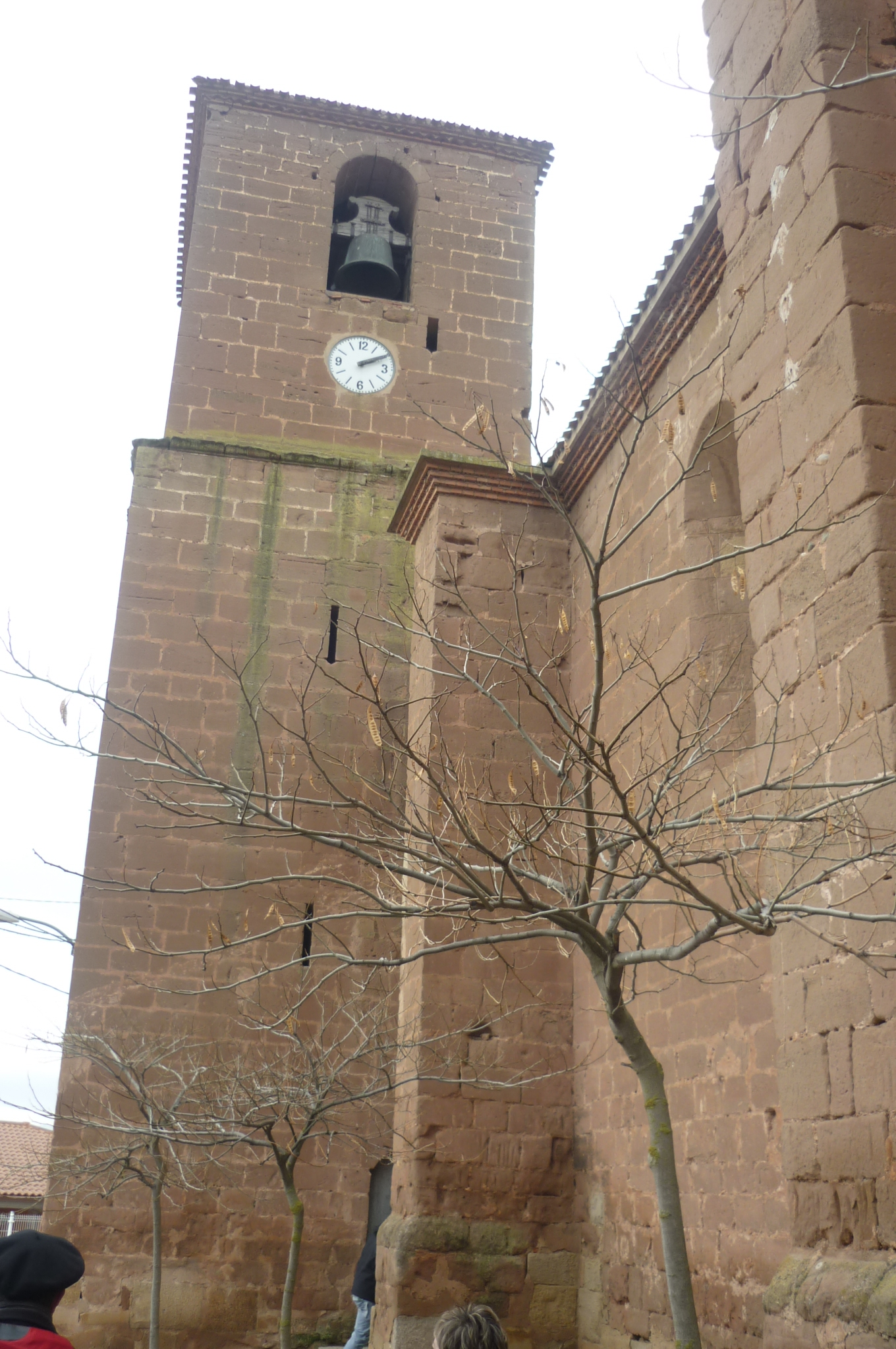 Exterior de la iglesia parroquial de Arenzana de Arriba (La Rioja, España)